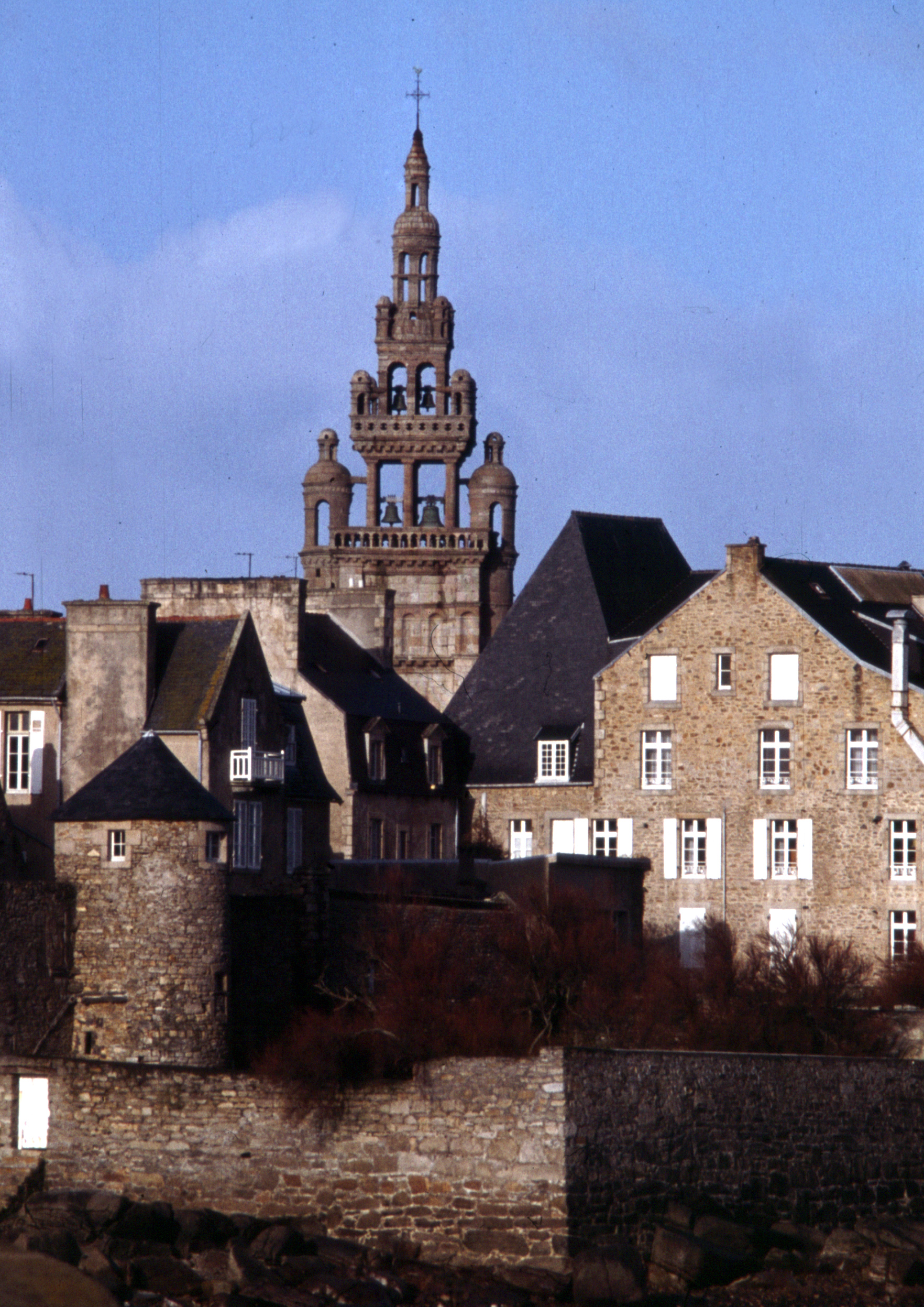 Roscoff, Notre-Dame de Croaz Batz 1978